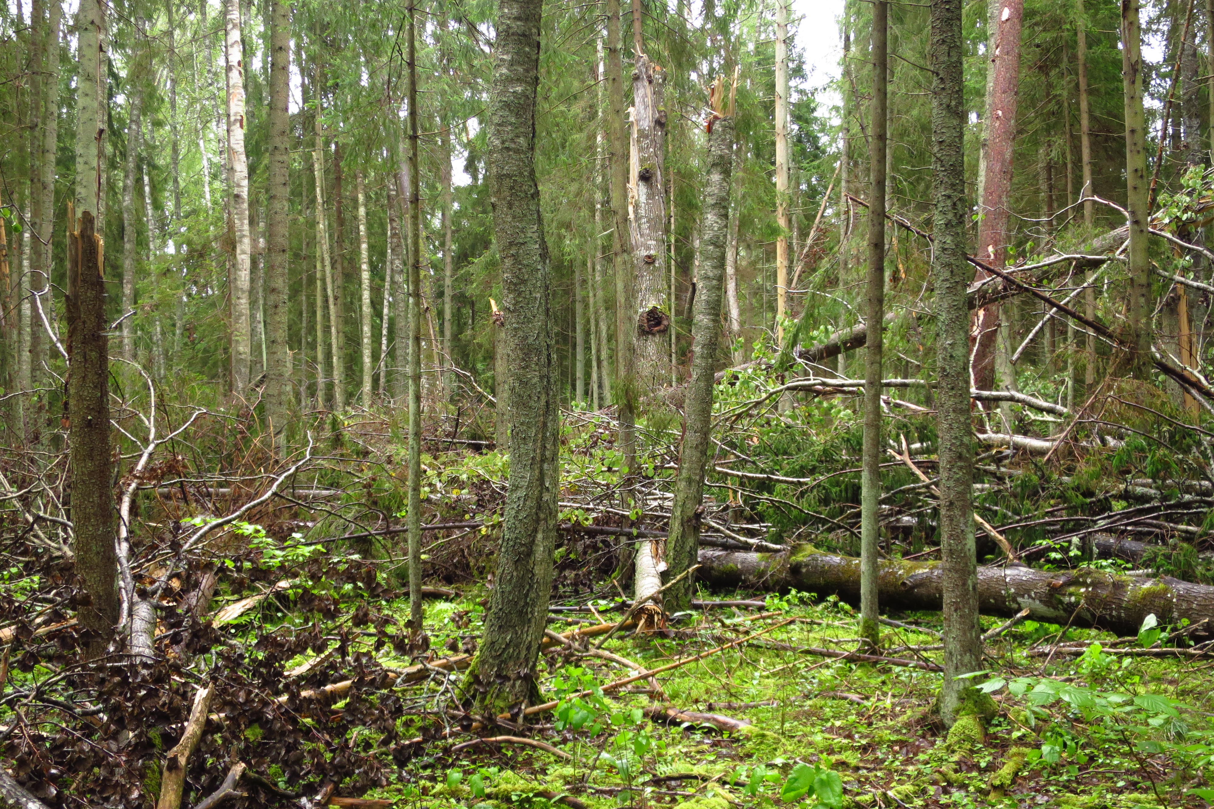 Tormimurd Mõisamõtsa LKA-l 2016. aasta augustis